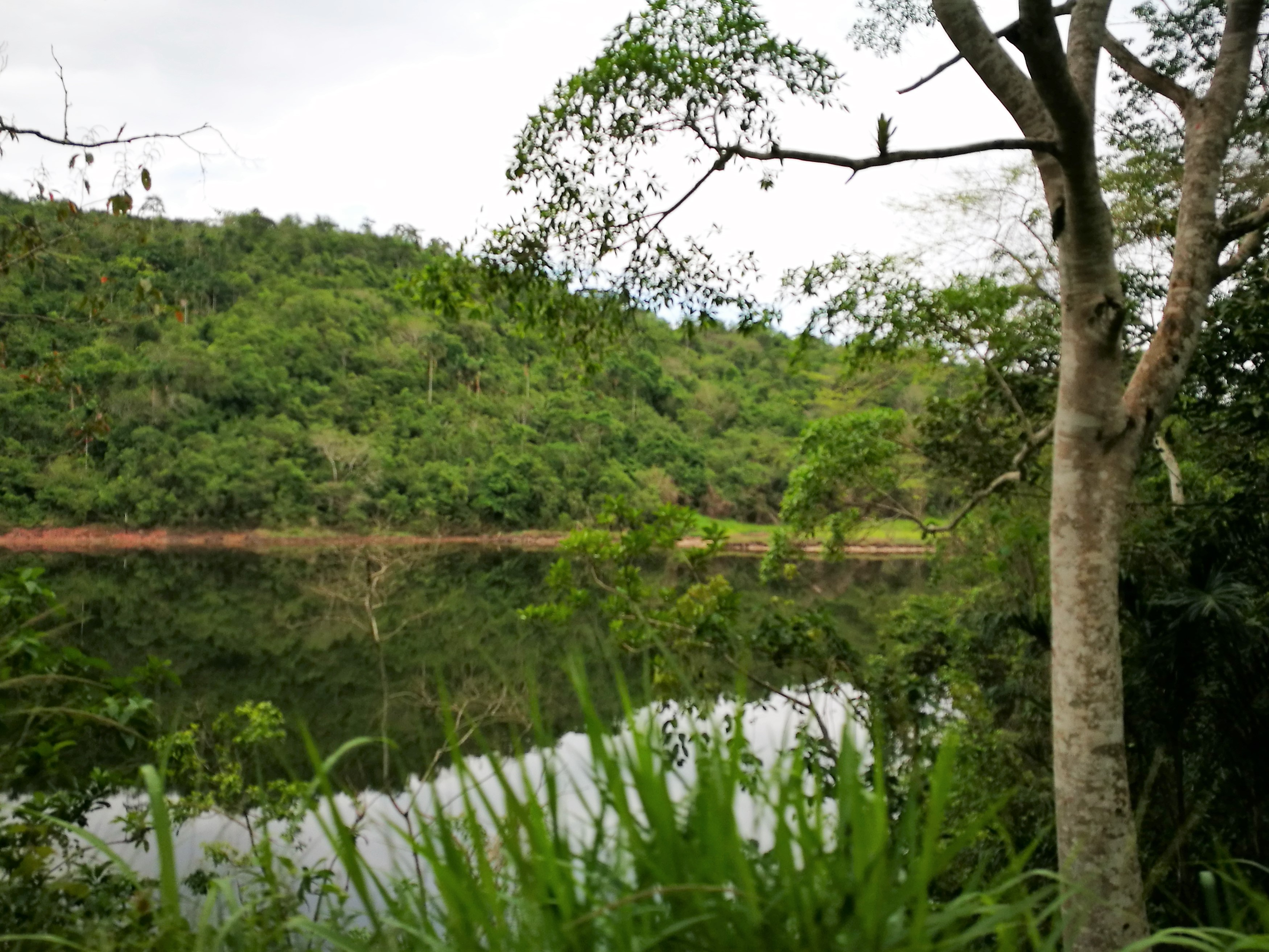 Llacuna petita al Distrito Alberto Leveau